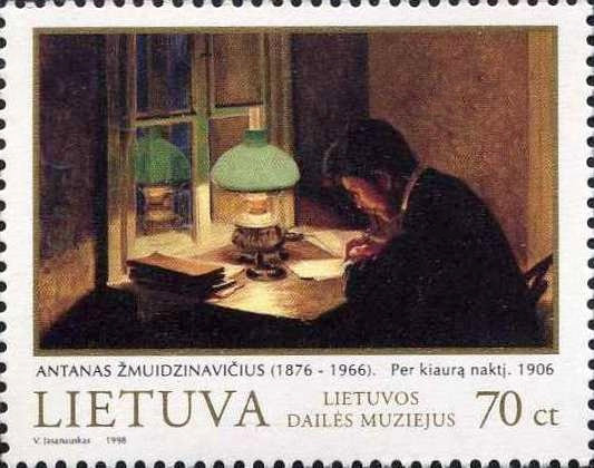 Antanas Žmuidzinavičius